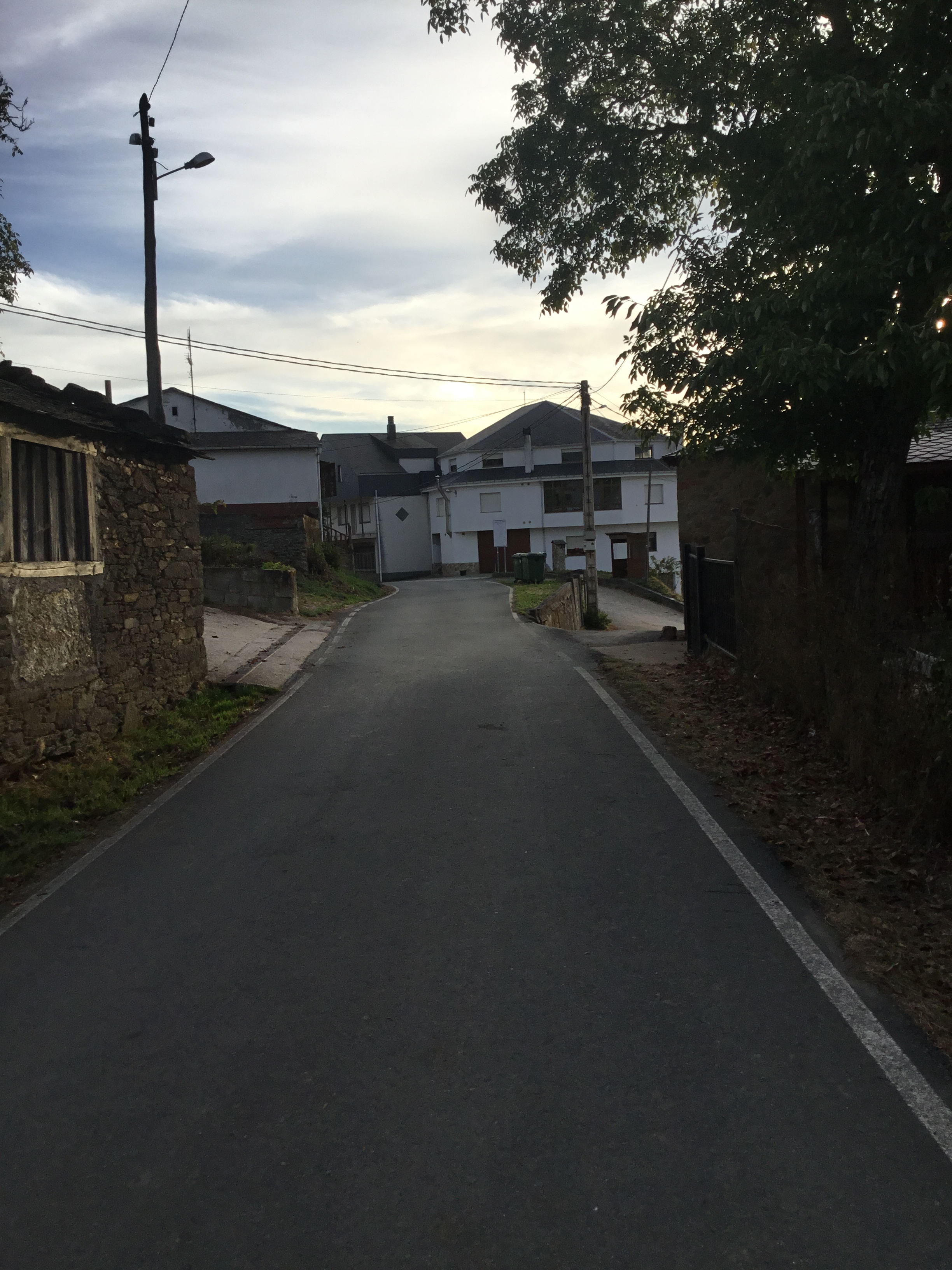 Centro del pueblo